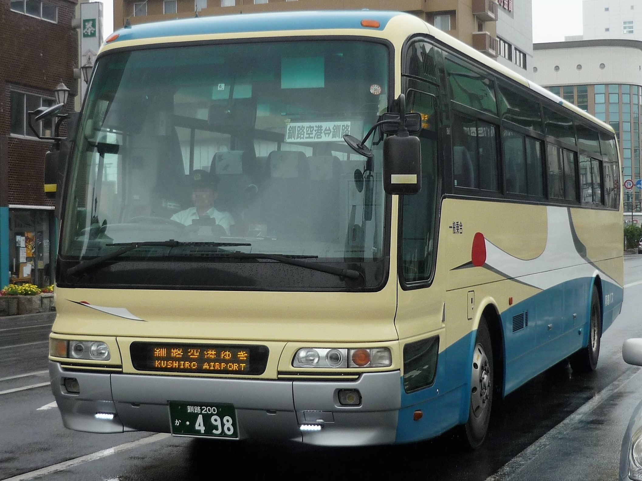 釧路市街地を走行する阿寒バス 釧路空港連絡バス